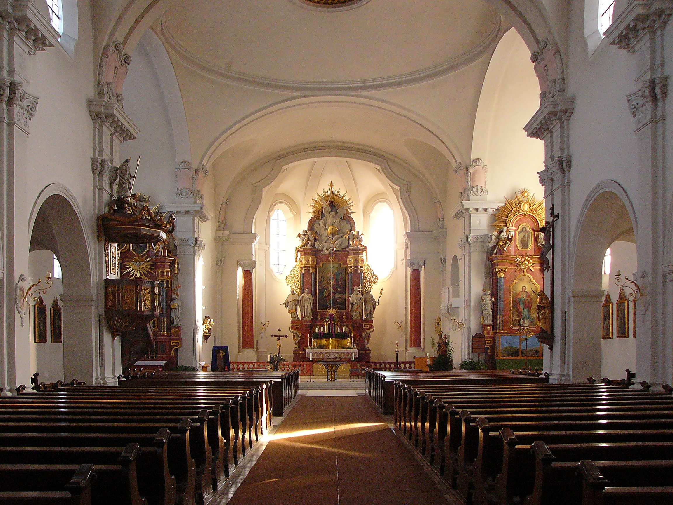 Kath. Pfarrkirche St. Margareta; neubarock, 1910-12 erbaut nach Plänen des Regensburger Architekten Heinrich Hauberrisser; mit Ausstattung.This is a photograph of an architectural monument.